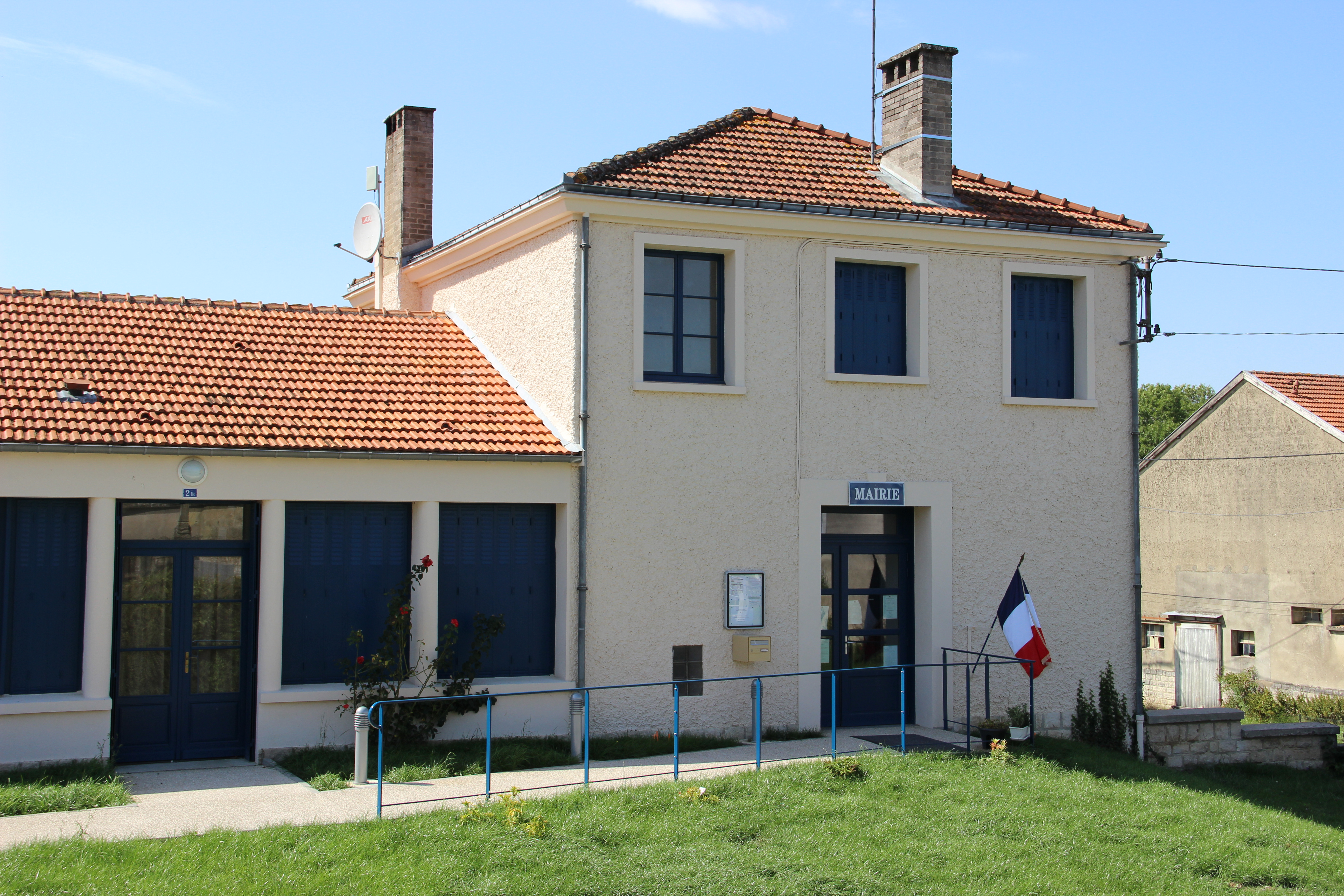 La mairie